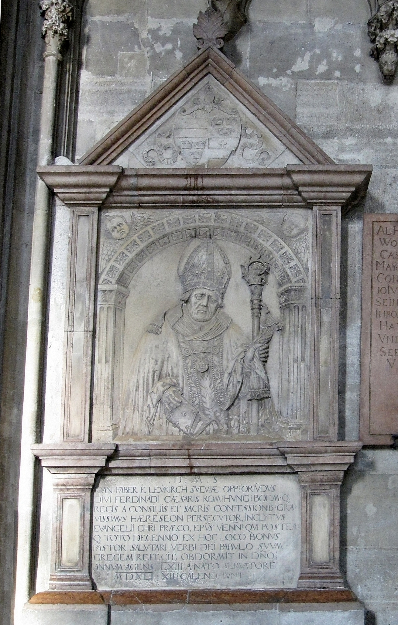 Wien, Stephansdom, Epitaph Johann Fabri